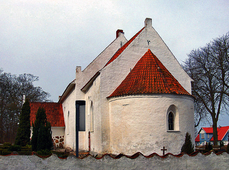 Arninge (Lolland) fra sydøst